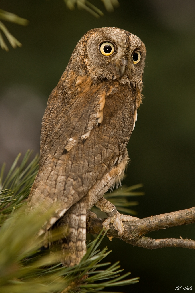 Otus scops, Herálec, Czech Republic